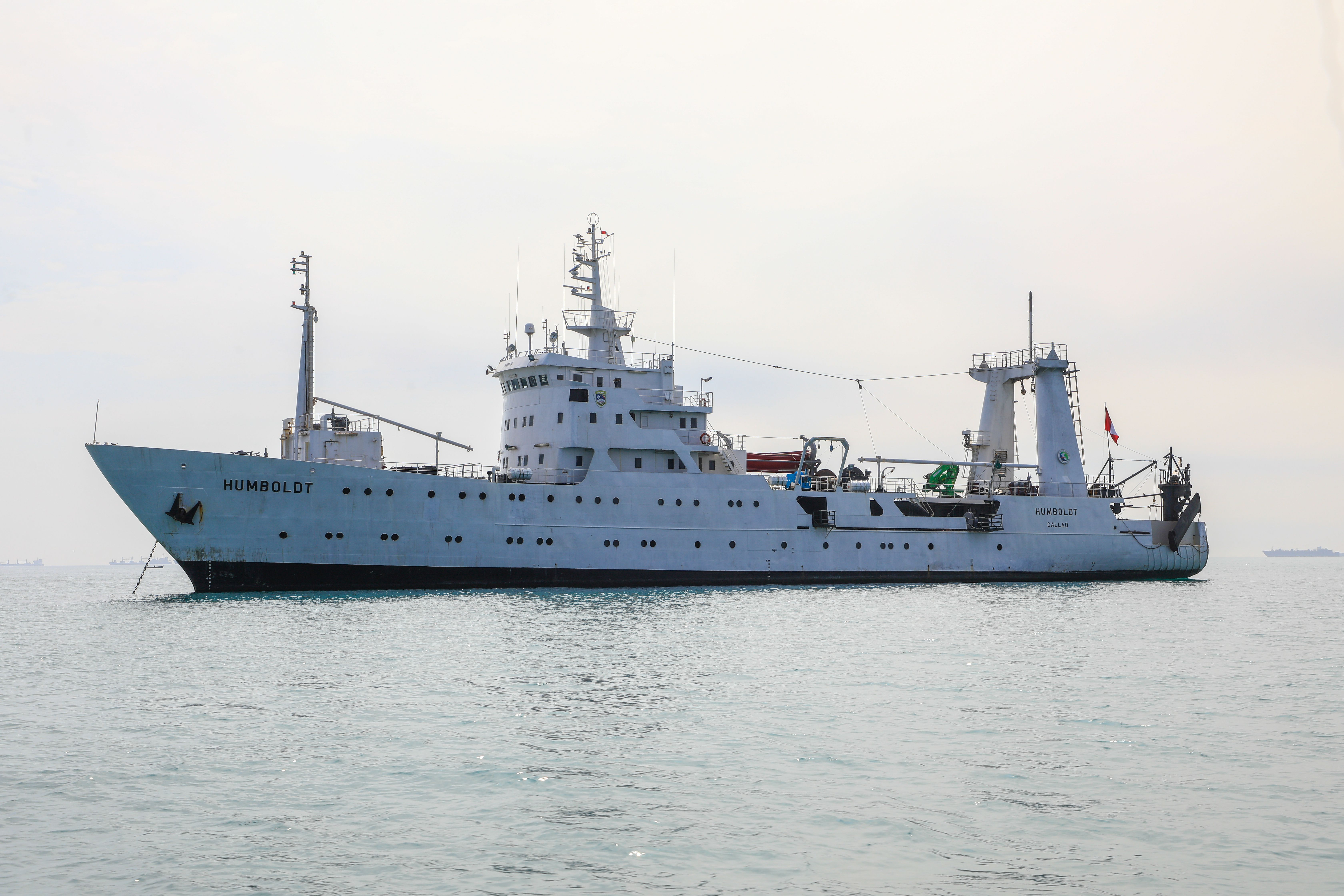 Zarpe del Humboldt en crucero de evaluación de la población de merluza desde el puerto del Callao